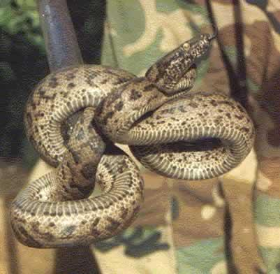 Puerto Rican Boa